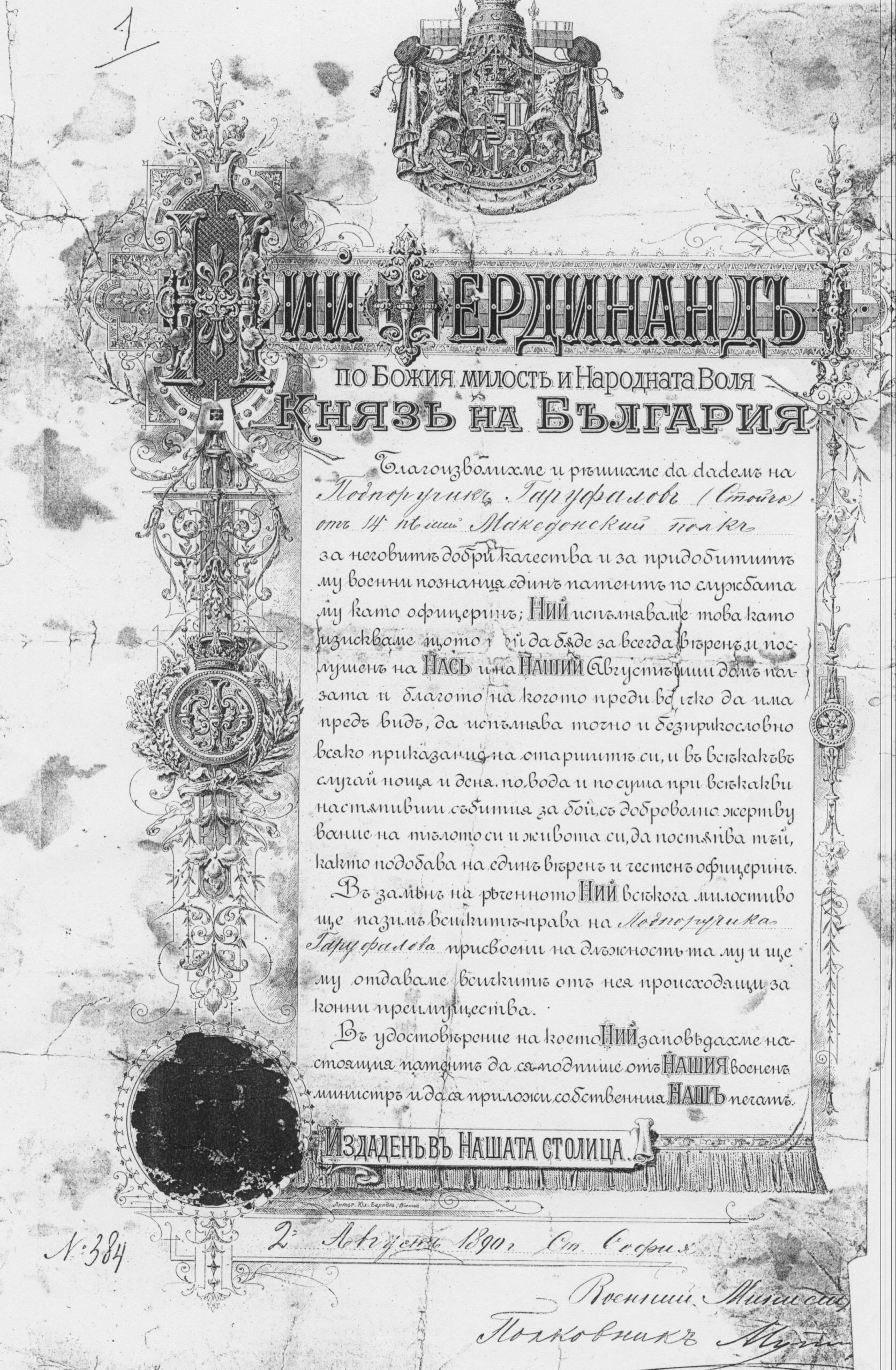 Документ за връчен патент на подпоручик Стойчо Гаруфалов от княз Фердинанд І